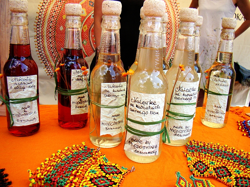 Die Ikonen der zeitgenössischen Volkskunst in Sanok